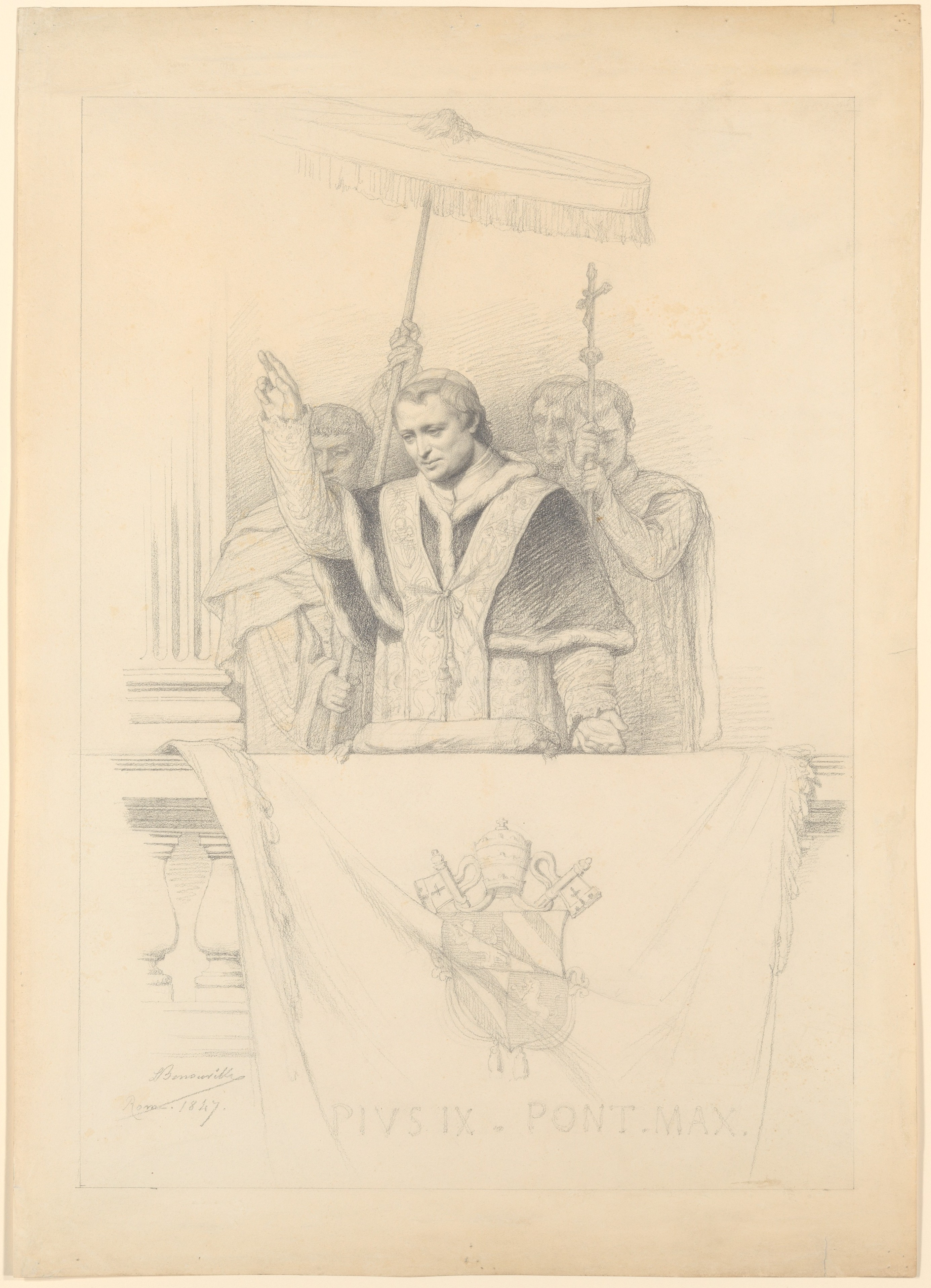 drawing